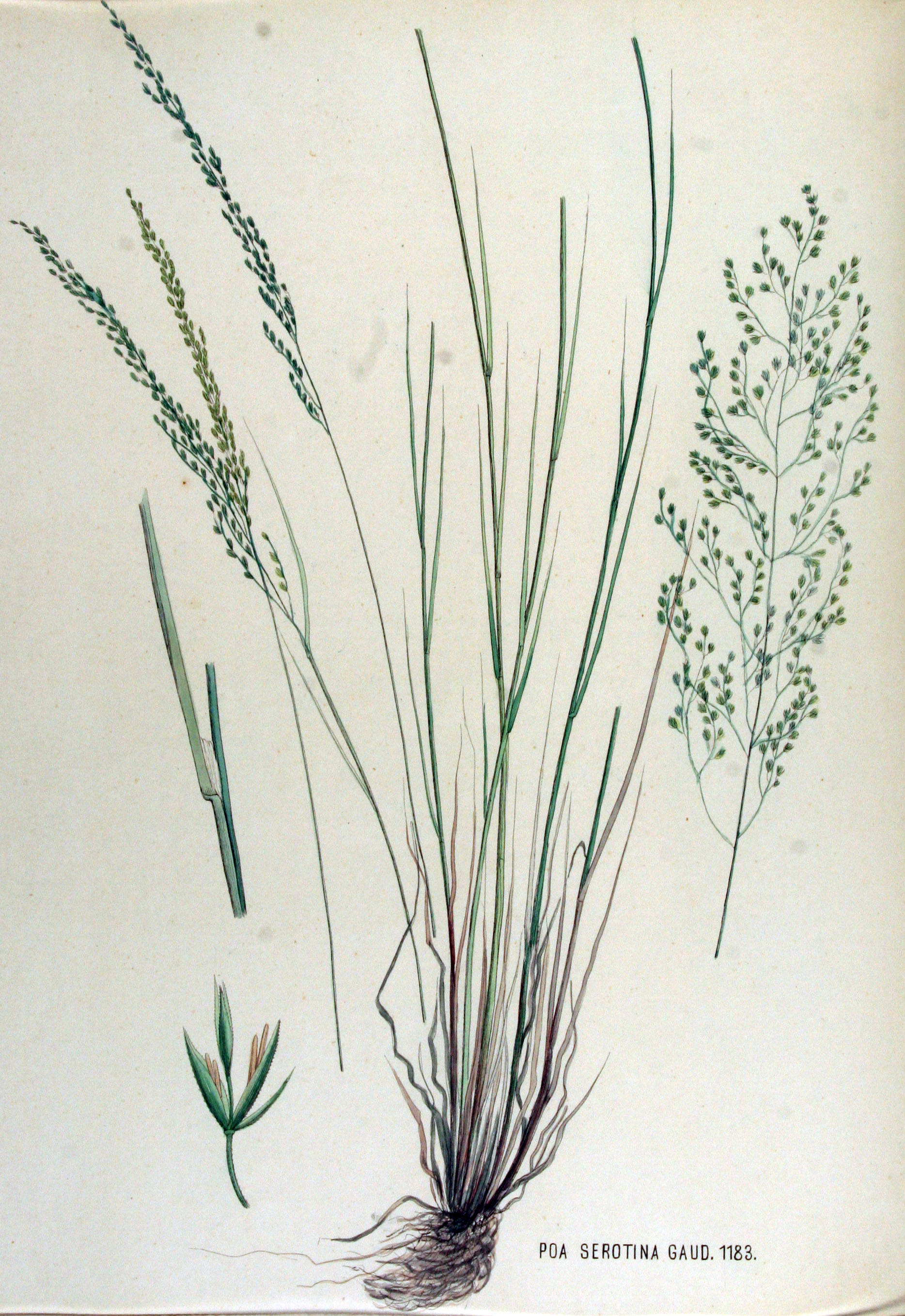 Poa palustris L. (Syn. Poa serotina Ehrh. ex Hoffmann)